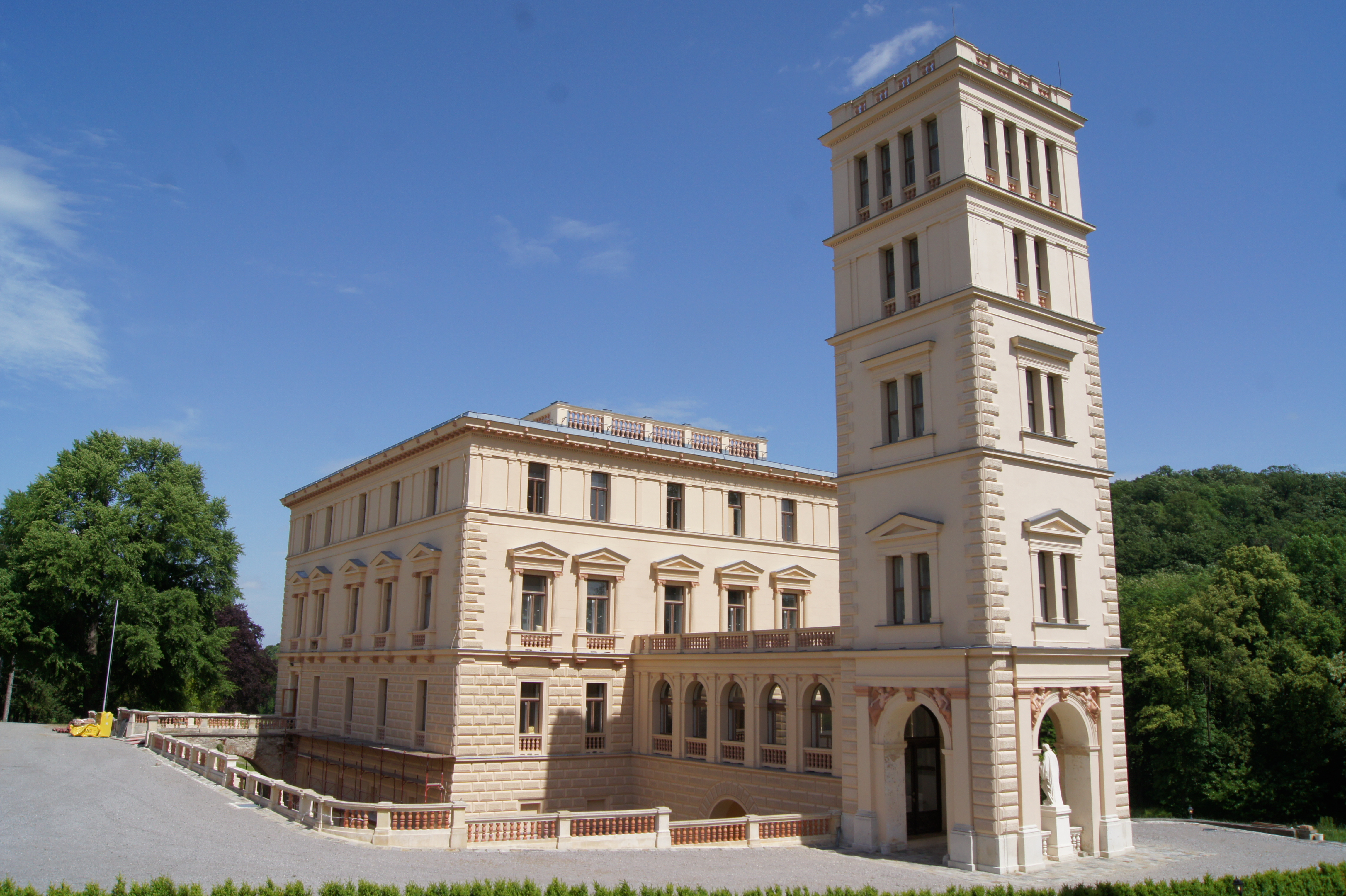 Schloss Rappoltenkirchen mit Nebengebäuden